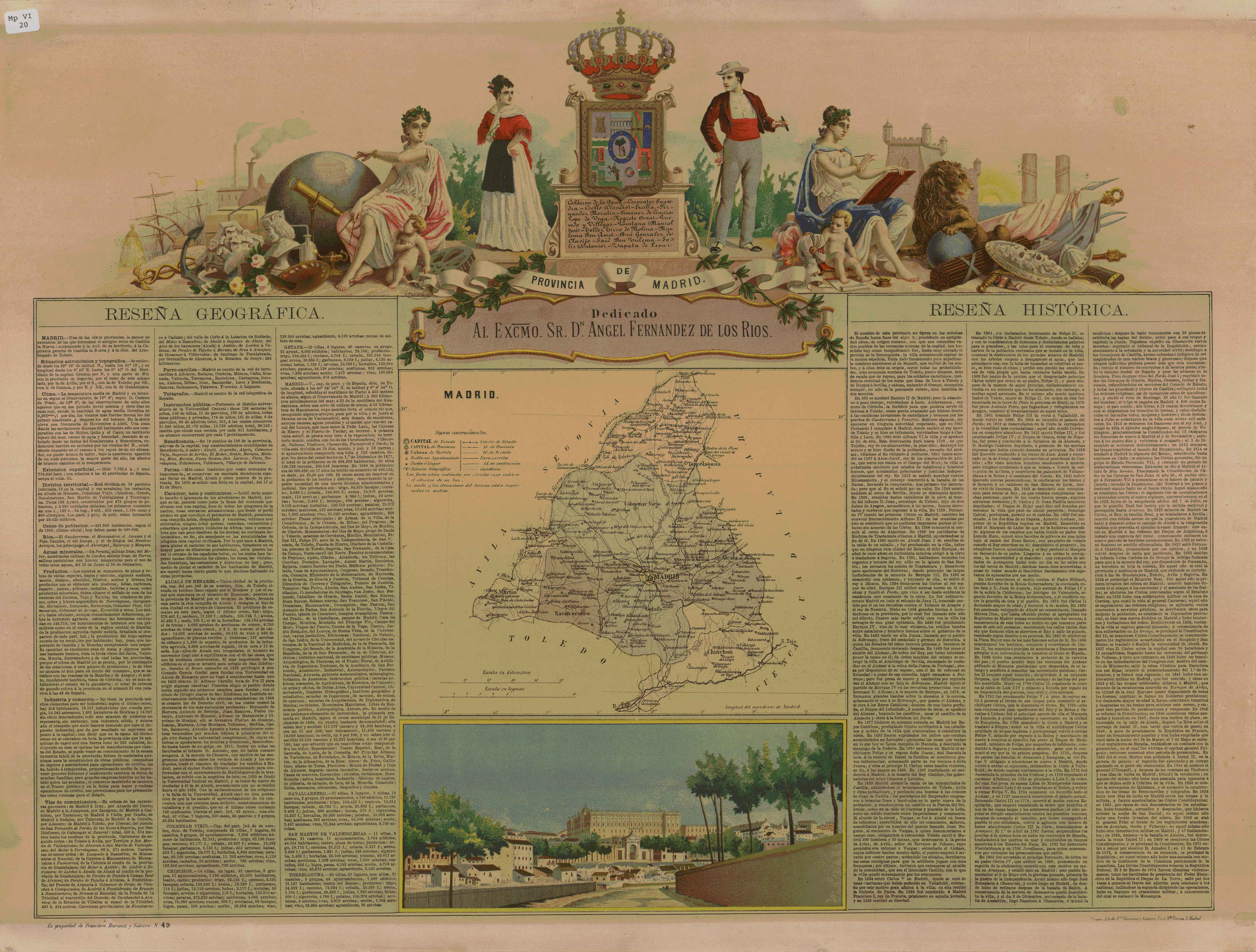 Mapa de la provincia de Madrid